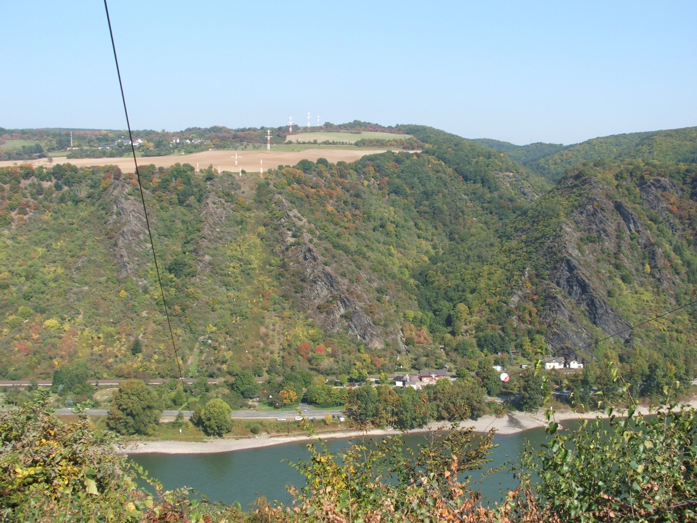 Rechtsrheinischer Teil der Rhein-Freileitungskreuzung Hirzenach-Oberkestert, aufgenommen von der linken Rheinseite